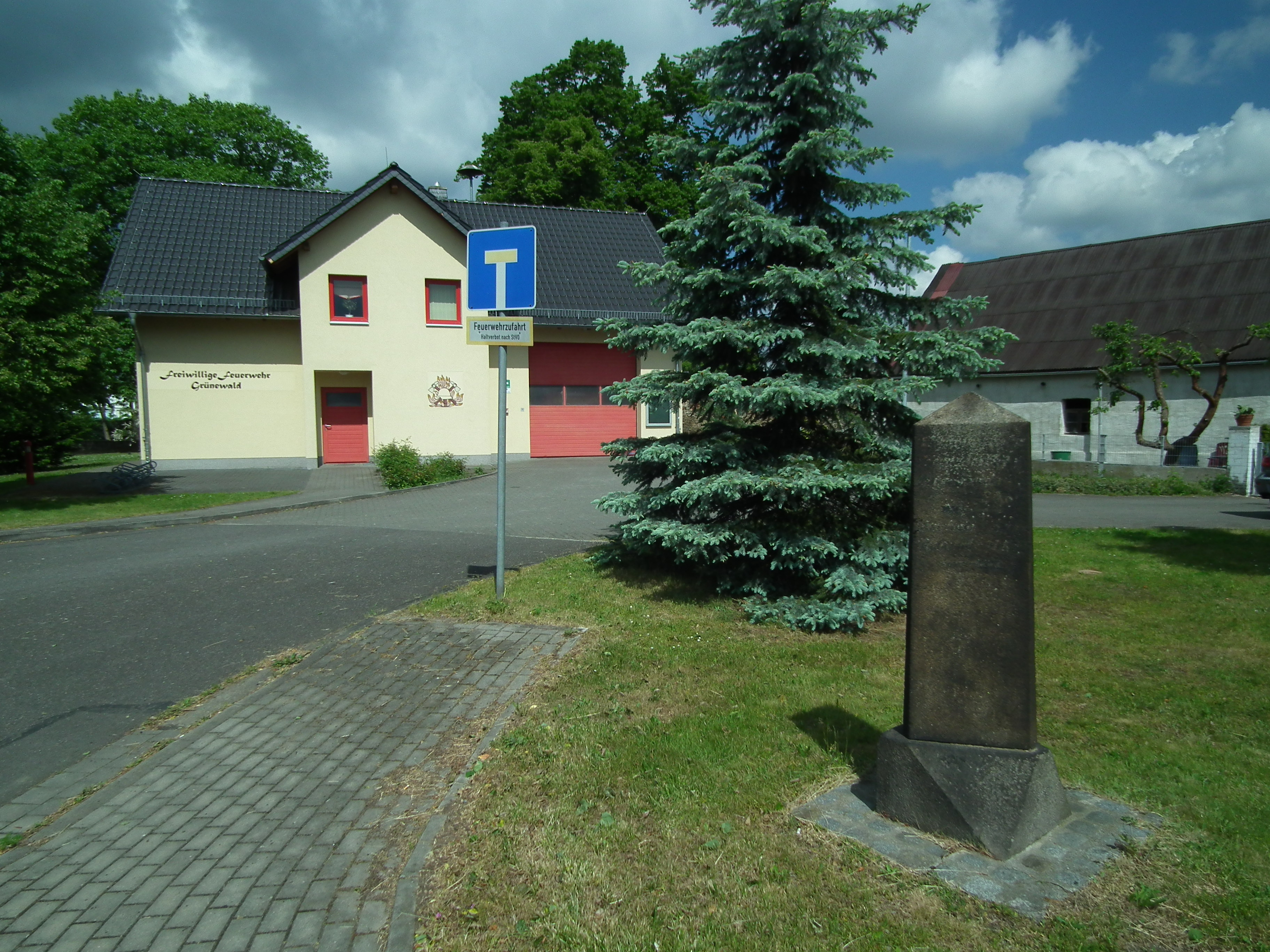 Grünewald